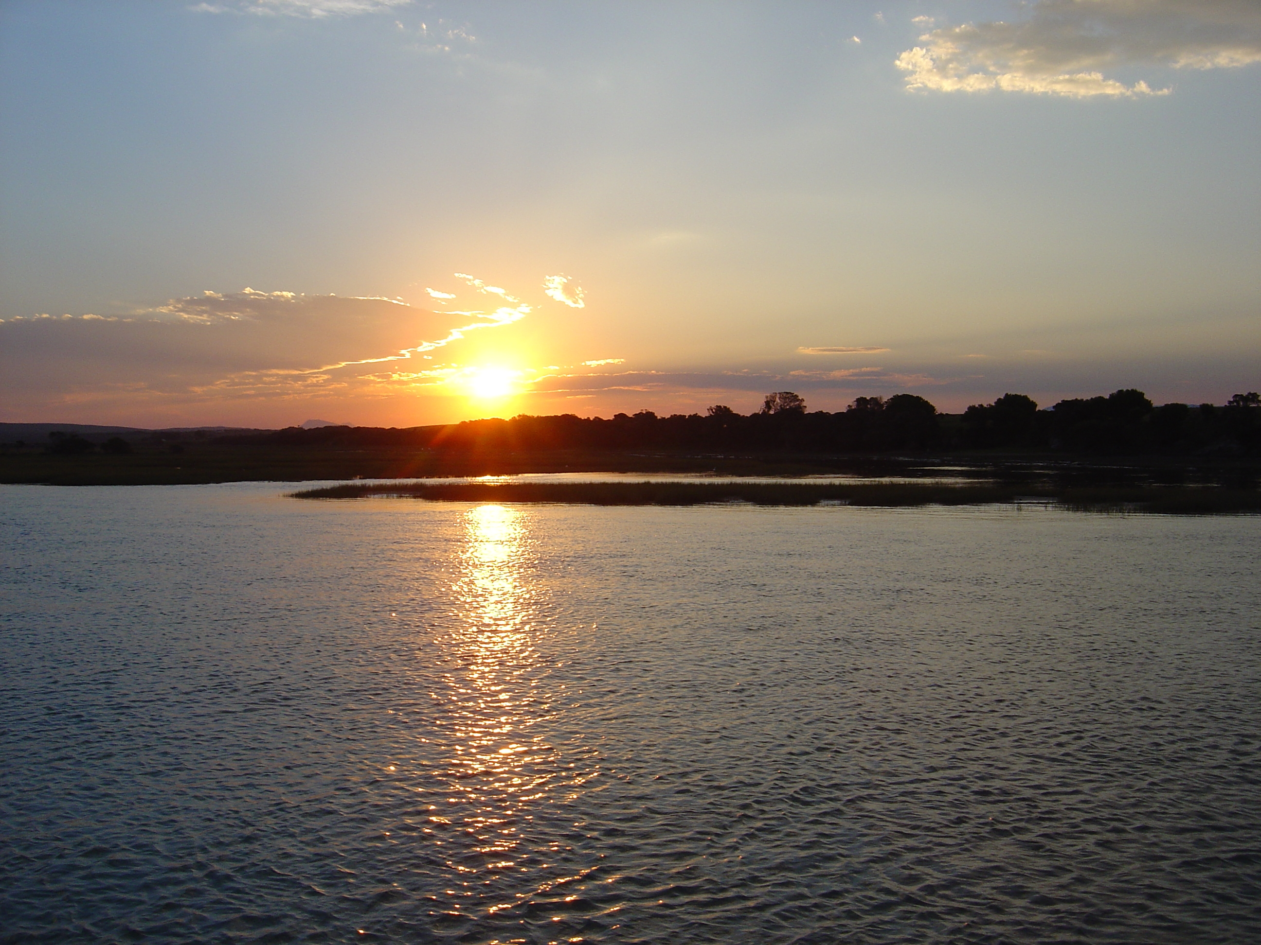 Zelfgemaakte foto van St. Francisbaai (uitzicht vanuit ons balkon). Ik zal van de week eens kijken of ik een betere foto kan vinden.